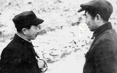 1942年7月，周恩来（右）与日本共产党主席野坂参三（左）在延安